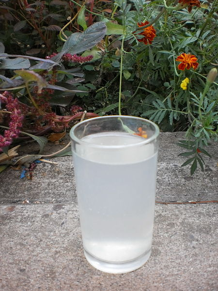 Пиће са лиметом.